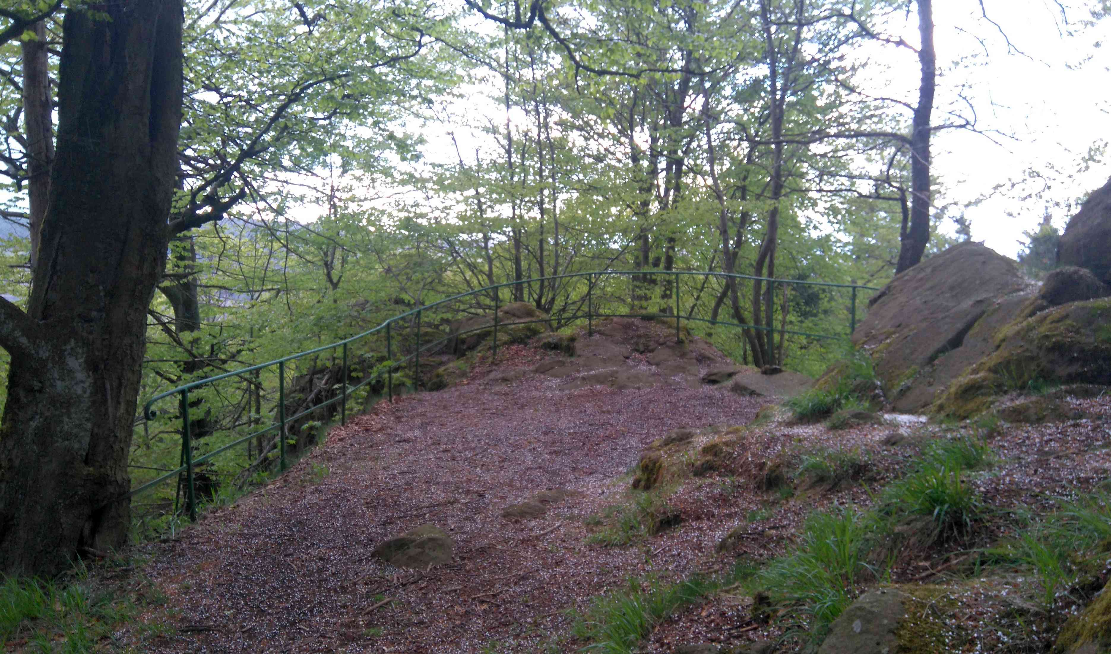 Rudolfklippe